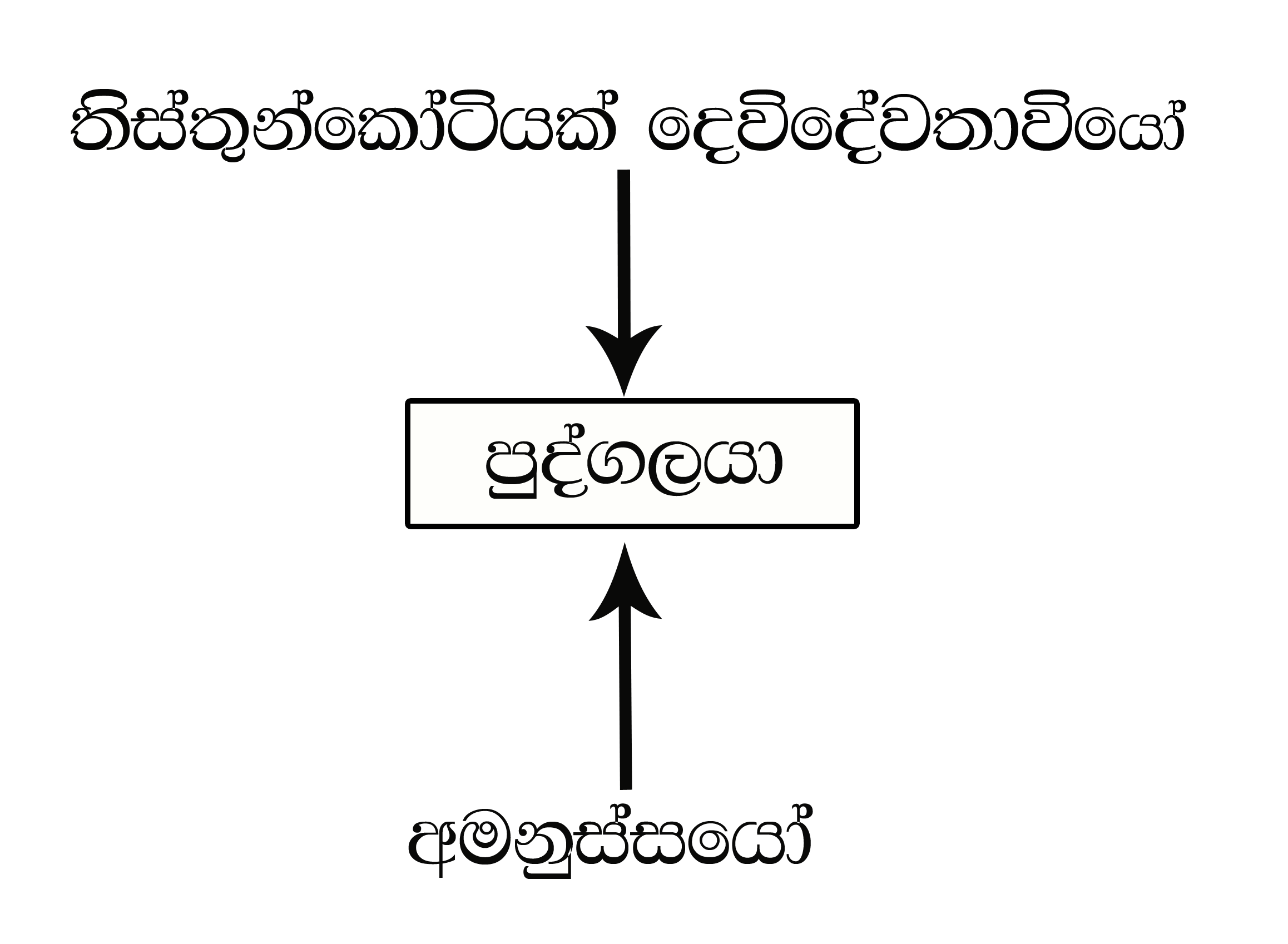 සිංහල: මහින්දාගමනයට පෙර යුගෙය් ලක්දිව බහුතර ජනතාව අරතර තිබූ ඇදහිලි ක්‍රමය